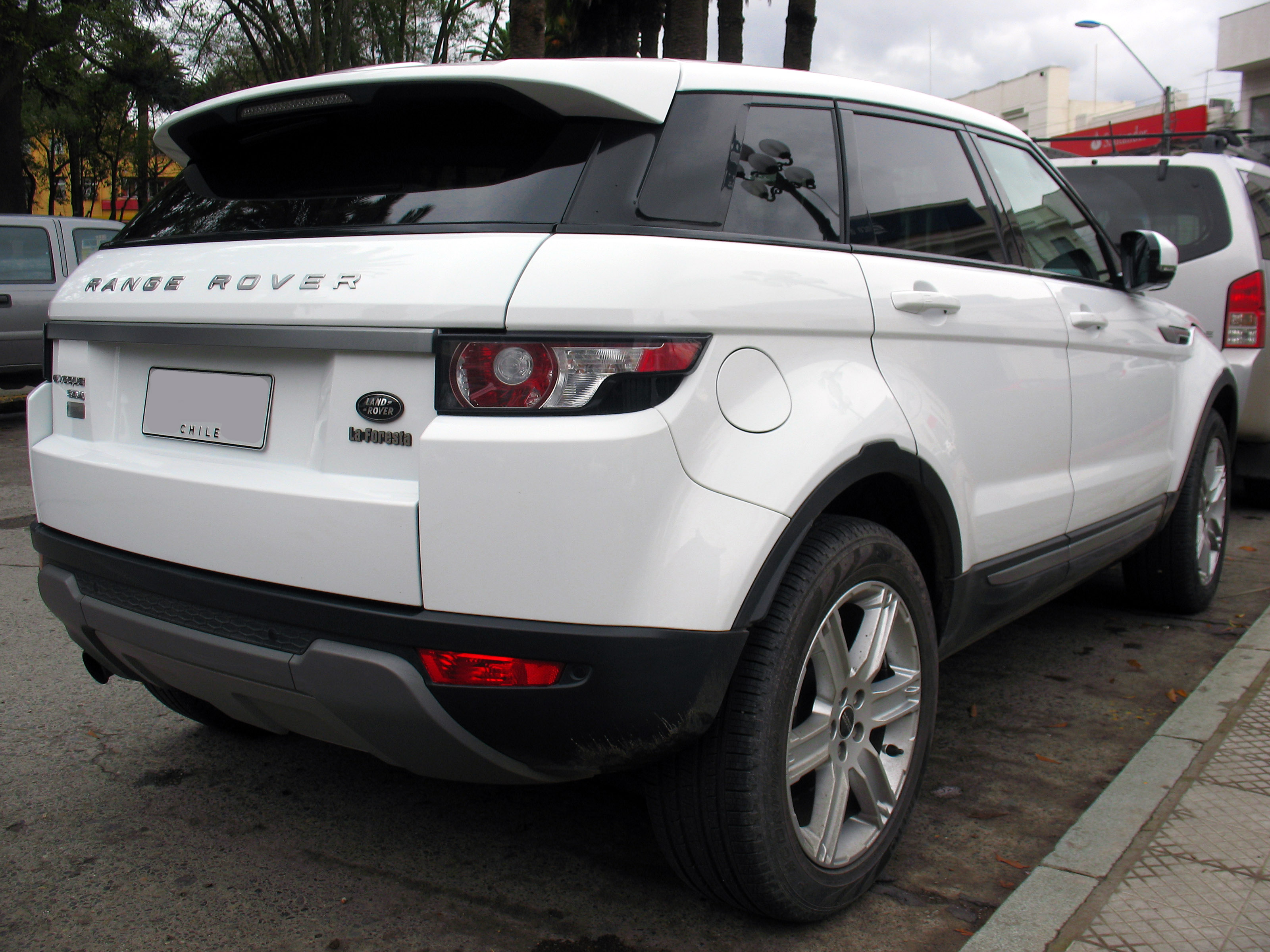 Land Rover Range Rover Evoque Prestige SD4 2012